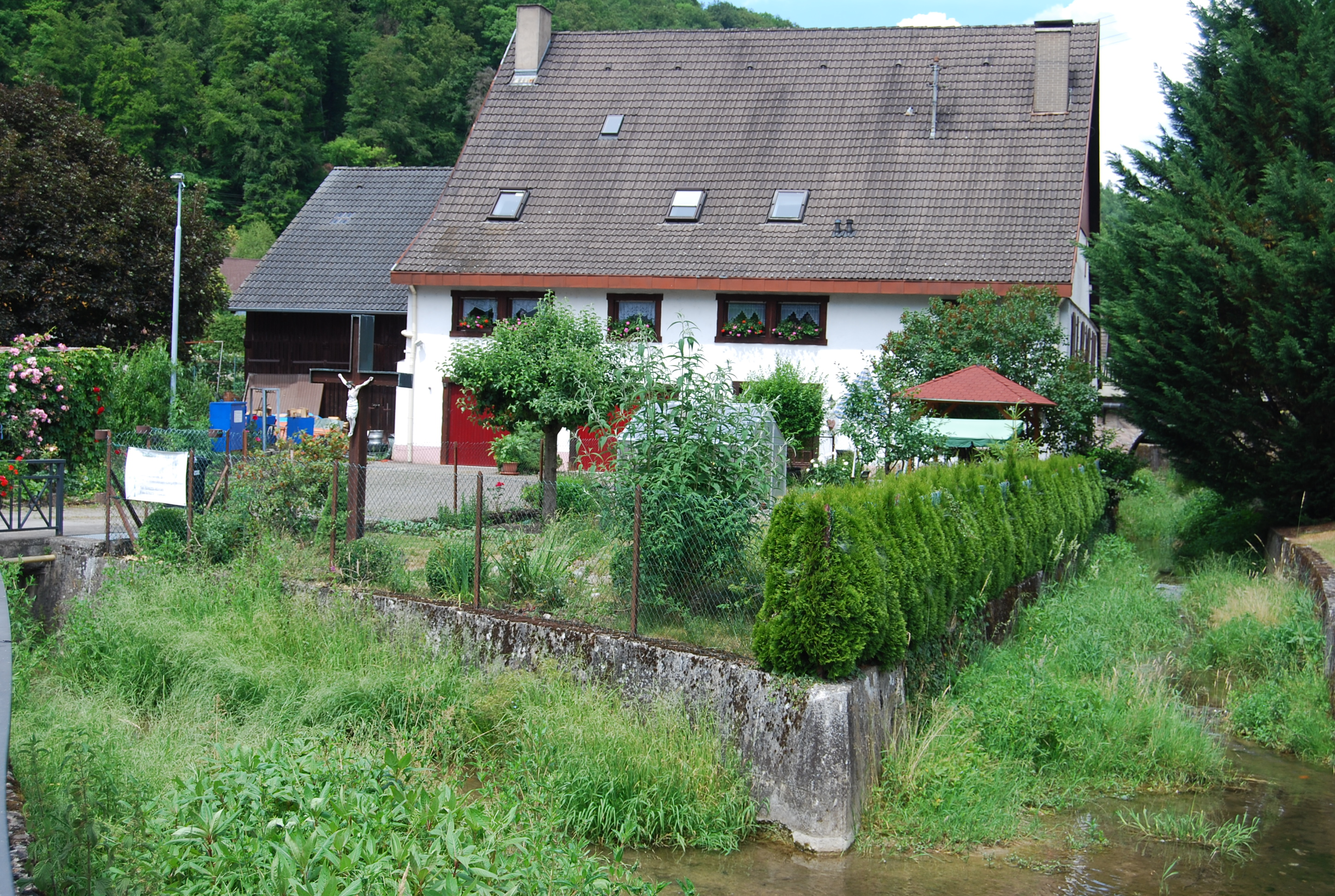 Zusammenfluss von Waidbach und Siebensteinbach in Degerfelden An dieser Stelle befand sich früher eine Burg der Herren von Tegerfelden